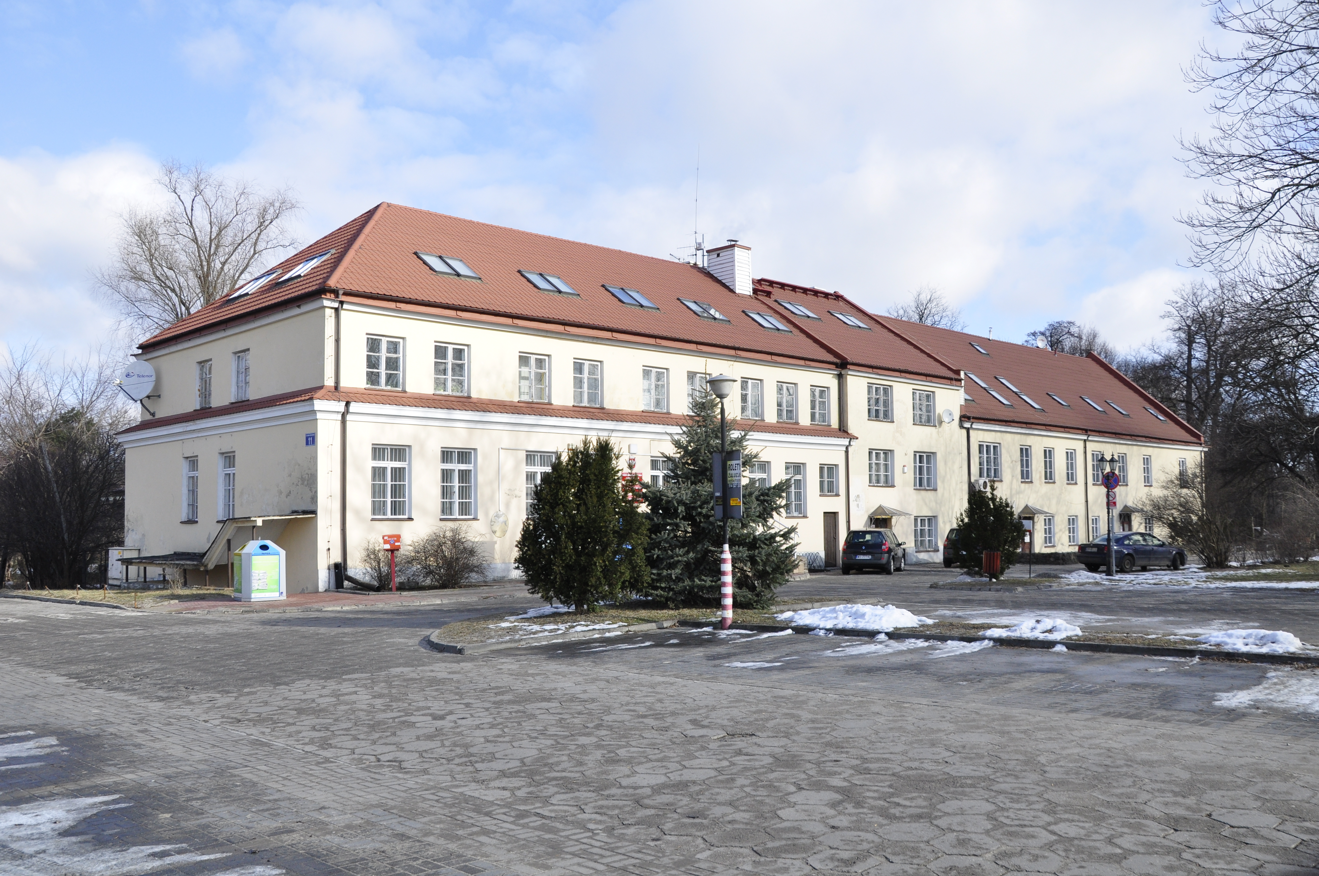 Wilanow